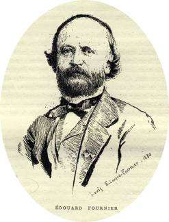 Édouard Fournier